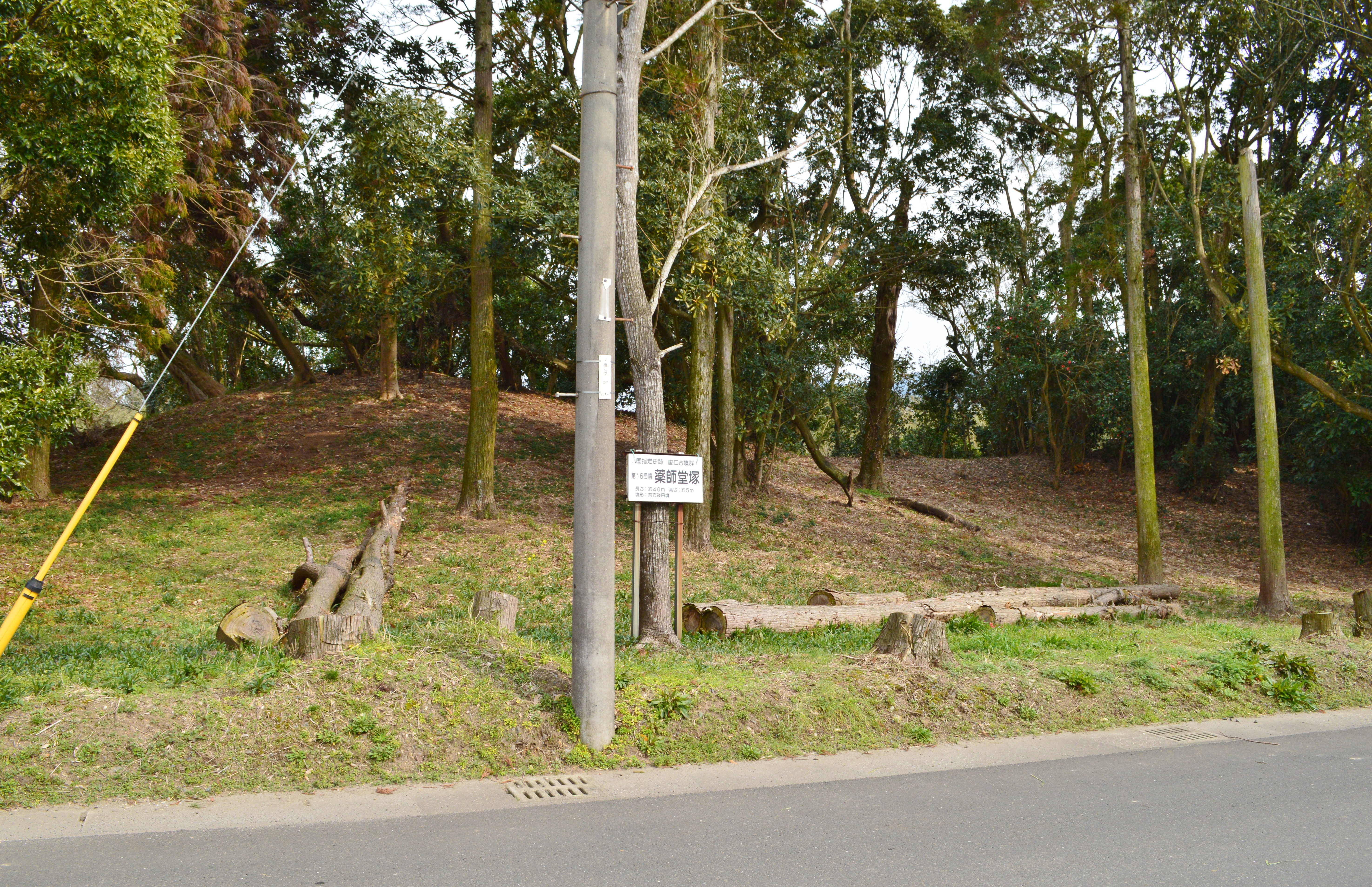 薬師堂塚古墳 (唐仁16号墳) 墳丘全景